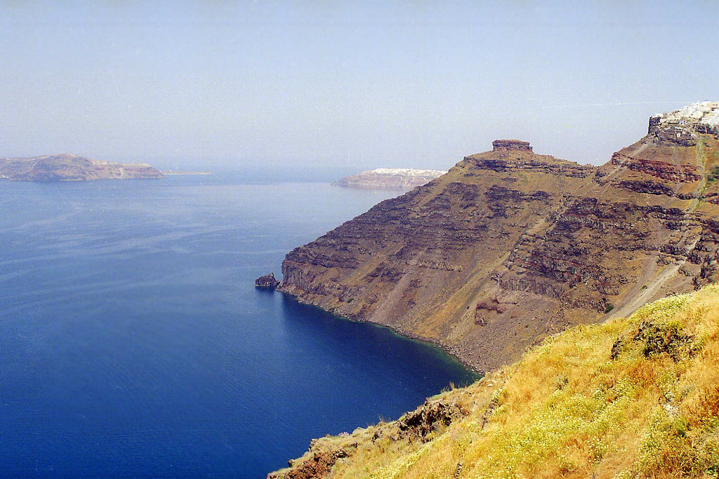 Sanorini - Thira, widok na morze z klifu, zdjecie Marek Silarski, lipec 2003